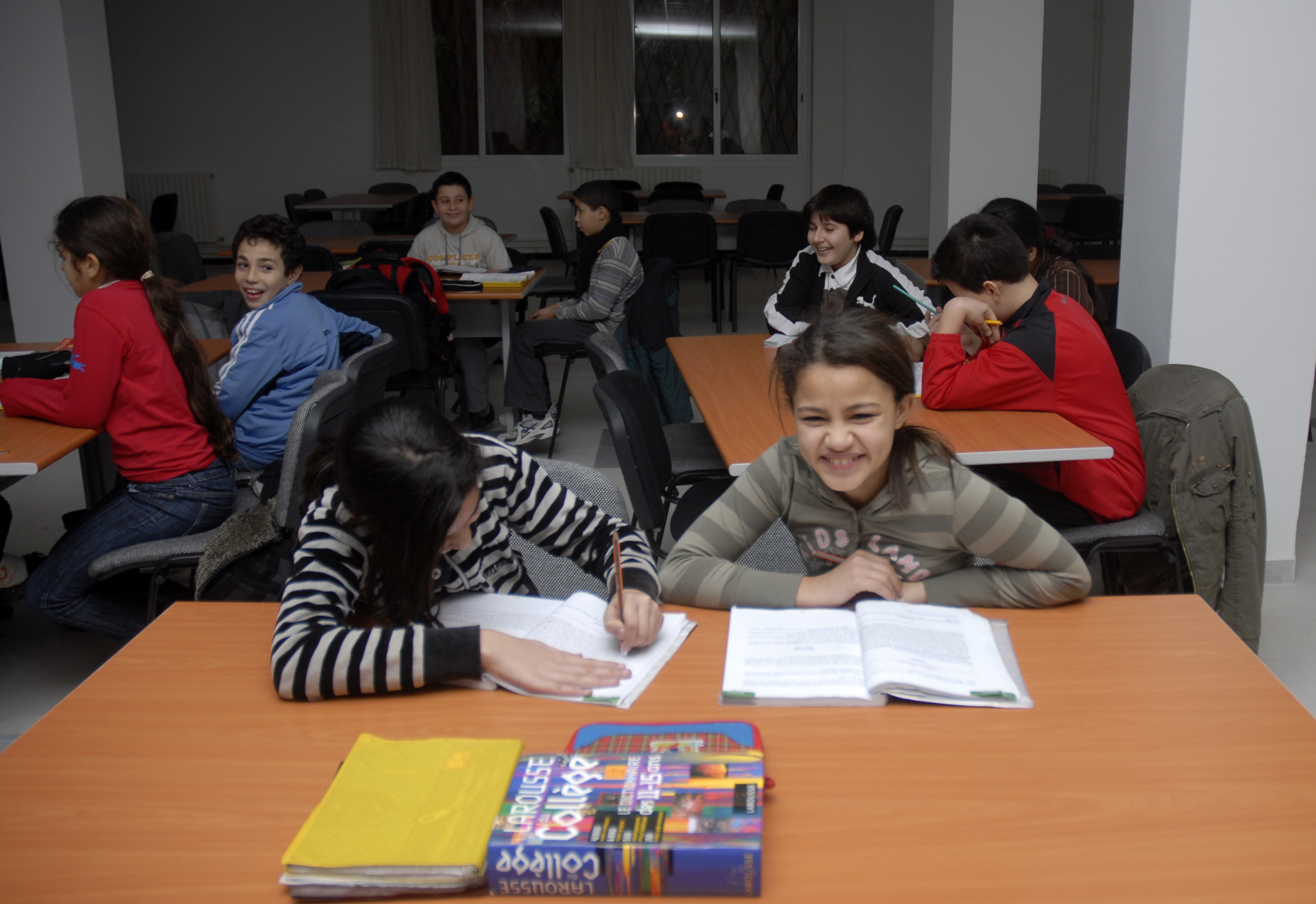 [Hayam El Hadi] Algerian pupils will now enjoy more free time and less schoolwork. من الآن فصاعدا سيتمتع التلاميذ في الجزائر بأوقات فراغ أكثر وأعمال مدرسية أقل. Les élèves algériens bénéficieront désormais de plus de temps libre et de moins de travail scolaire.